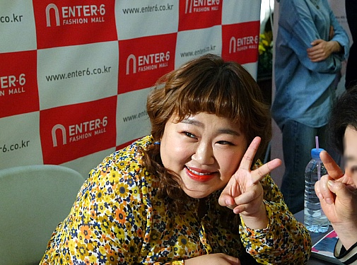 5/5(토) 엔터식스 강변테크노마트점, 개그우먼 후기